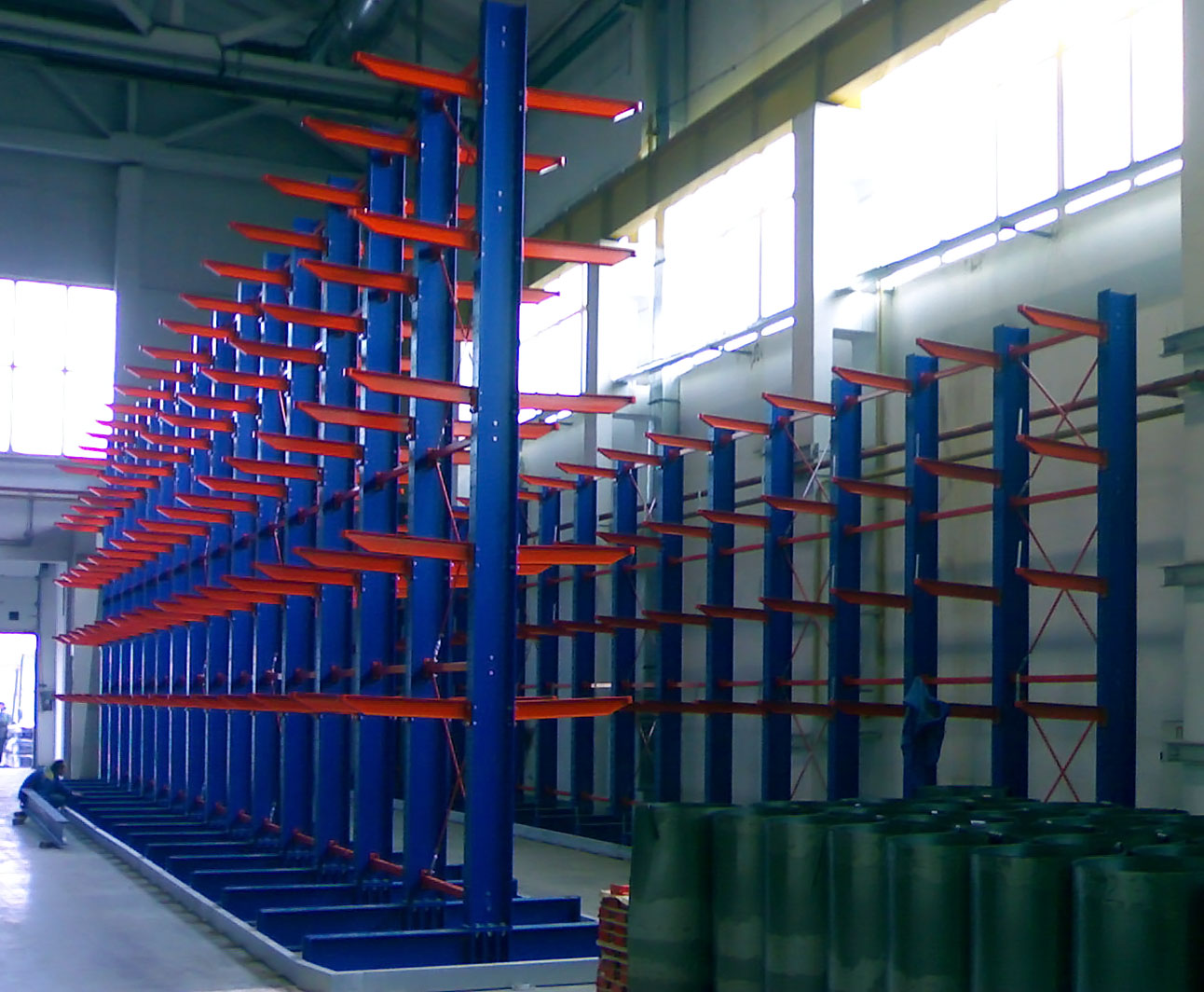 Фото двусторонней конструкции